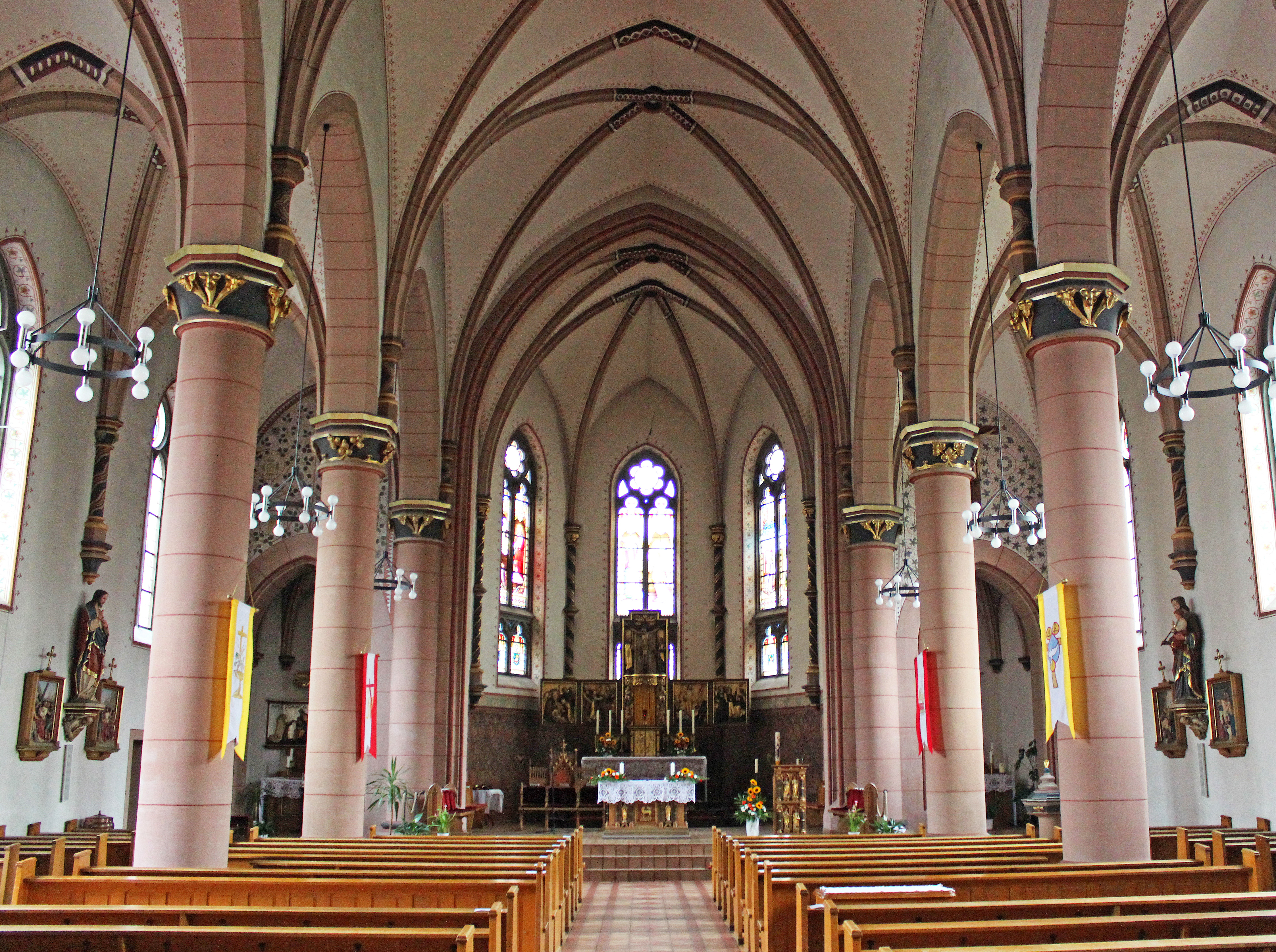 Blick ins Innere der katholischen Pfarrkirche St. Gangolf in Differten, Gemeinde Wadgassen, Landkreis Saarlouis, Saarland